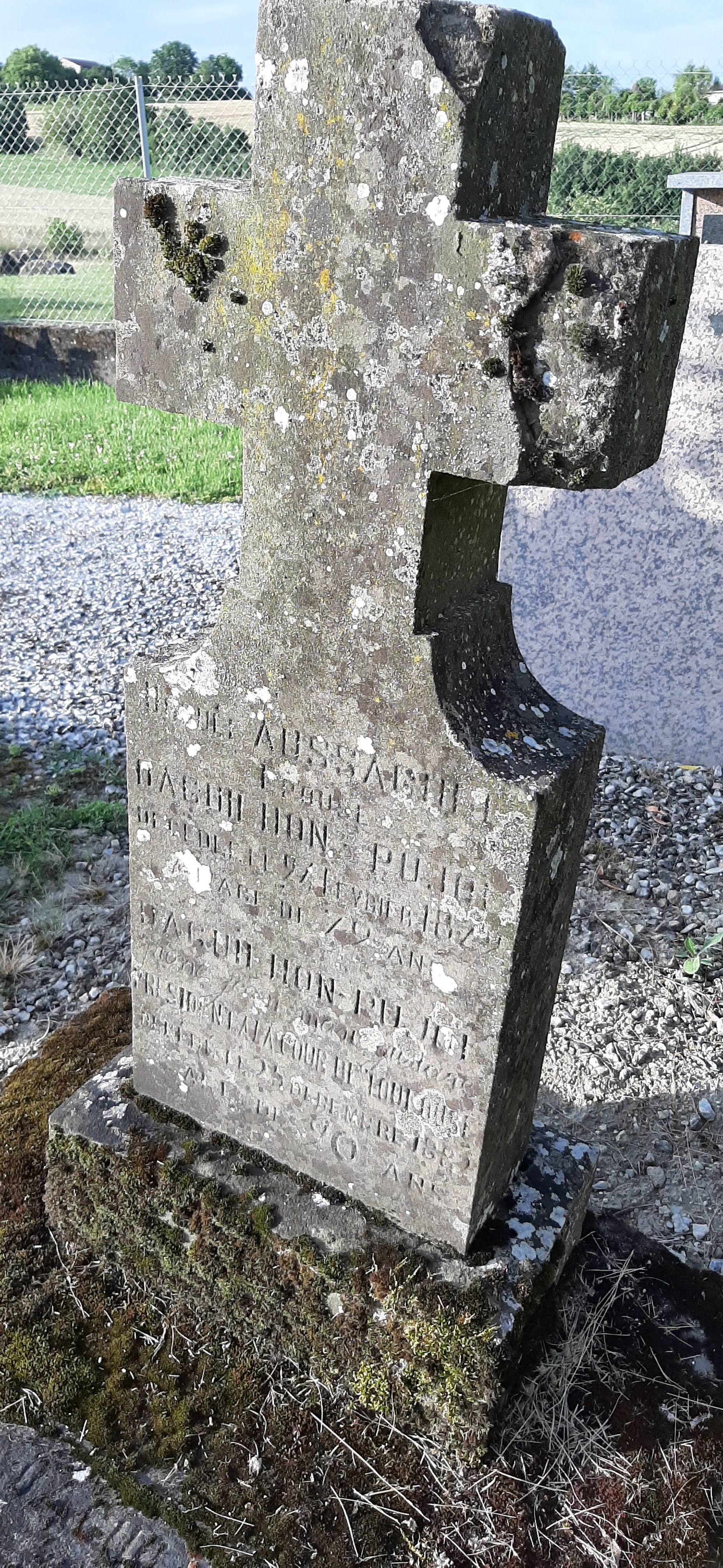 Tombe daguihlon-pujol cimetère saint-etienne à Massac Séran